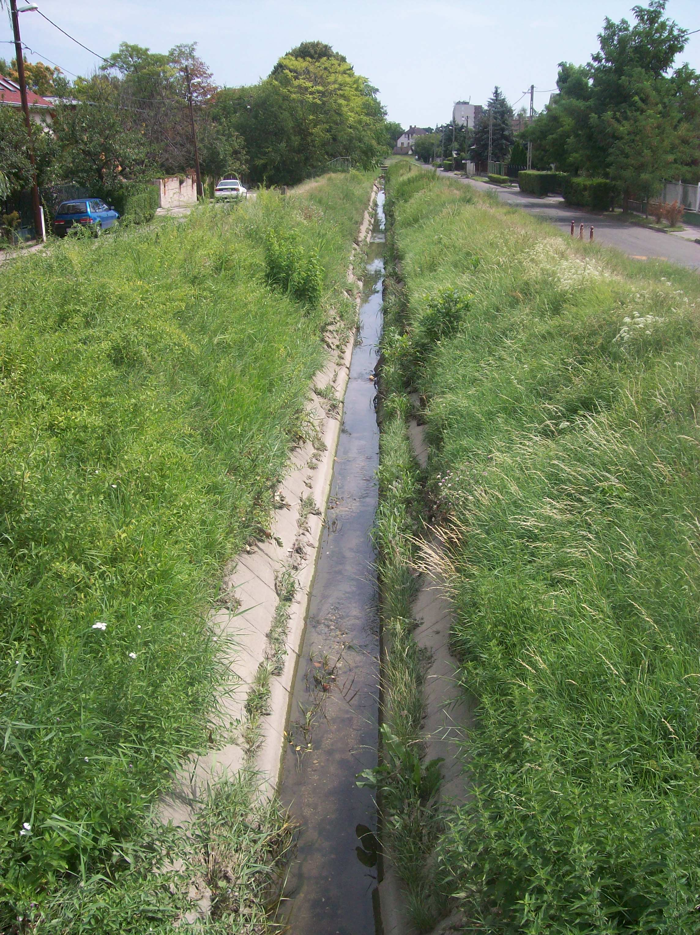 A Keserű-ér Albertfalván, a Károly Iréneusz József utcában (Budapest, XXI. ker.)